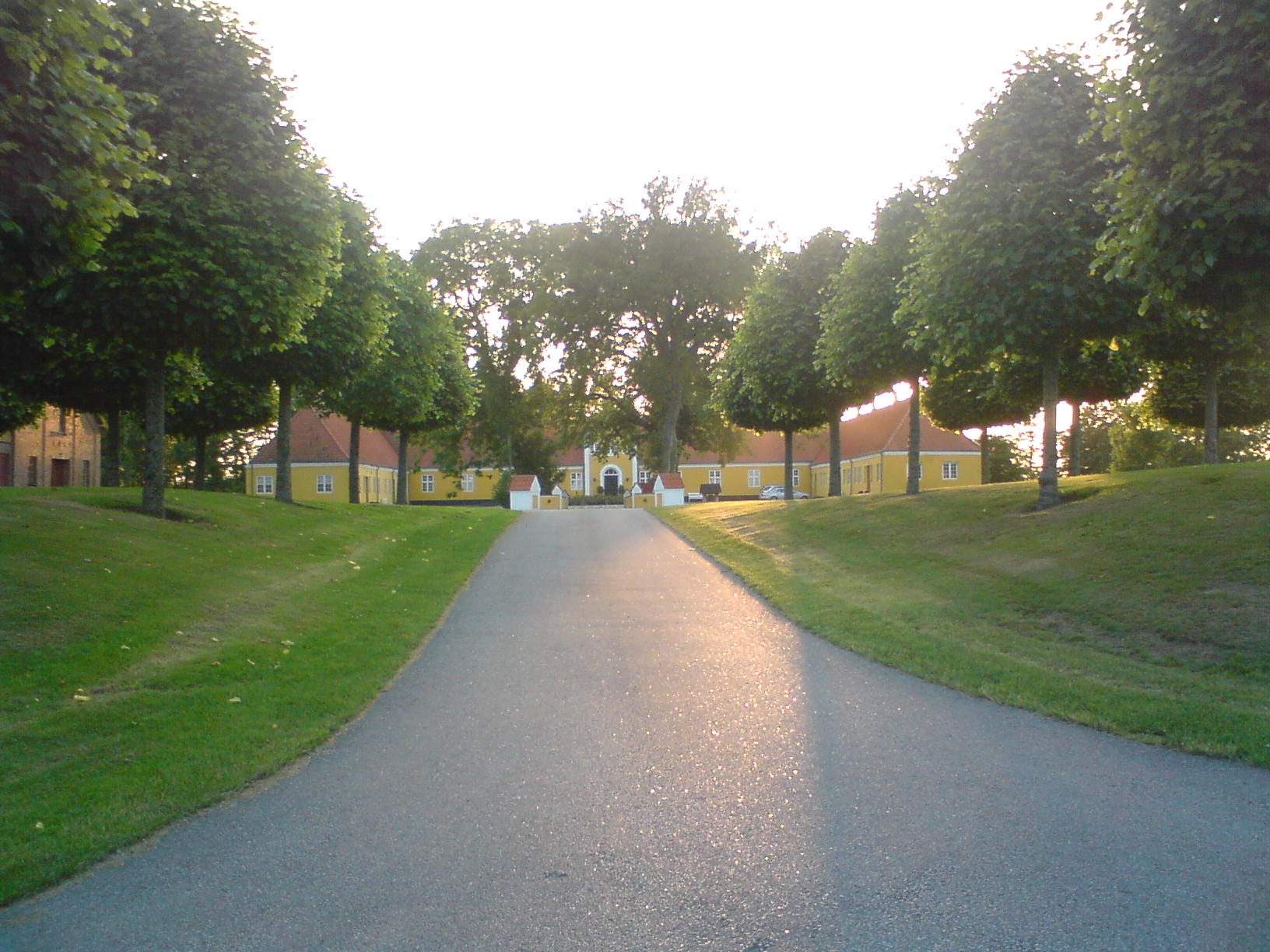 Baggesvogn herregård